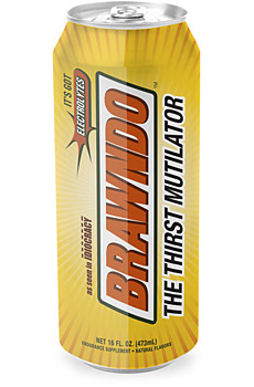 Branwdo